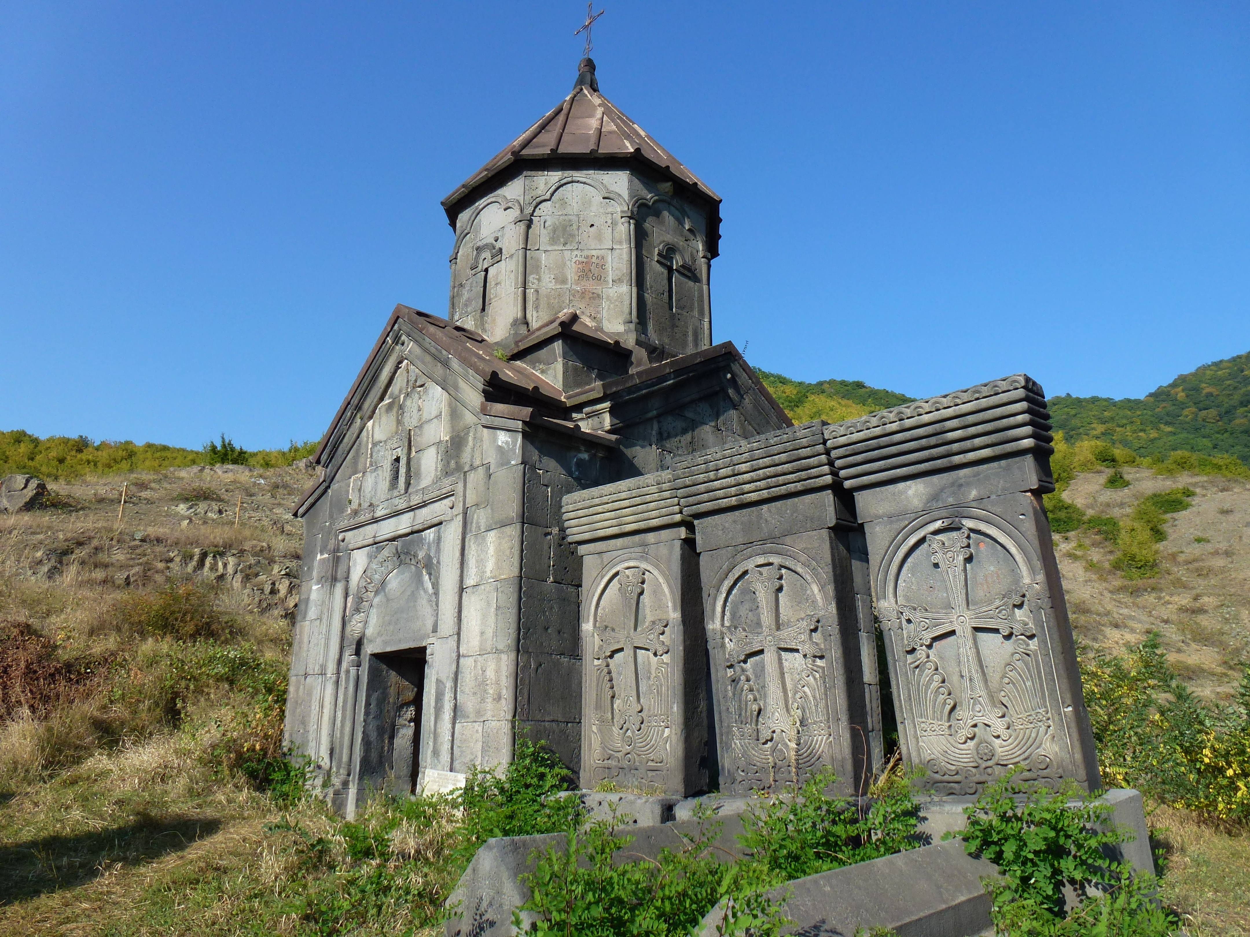 Կուսանց Անապատ եկեղեցի 60/16